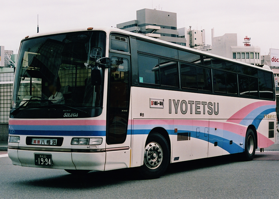 伊予鉄南予バス さぬきエクスプレス八幡浜 日野セレガ U-RU2FRAB